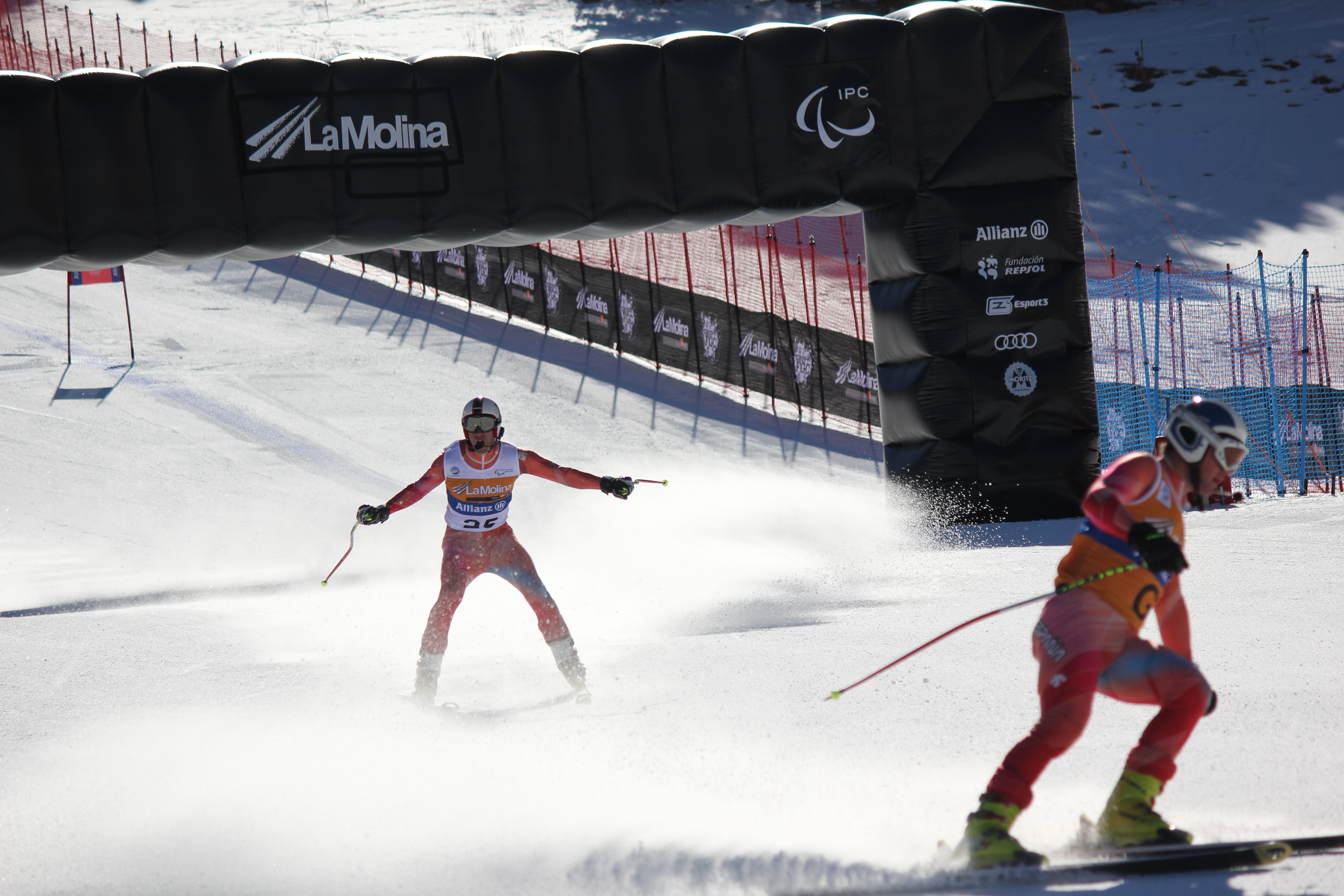 Gabriel Gorce y su guía Arnau Ferrer cruzando la meta en la prueba de descenso de los Campeonatos del Mundo 2013 IPC de La Molina, España.